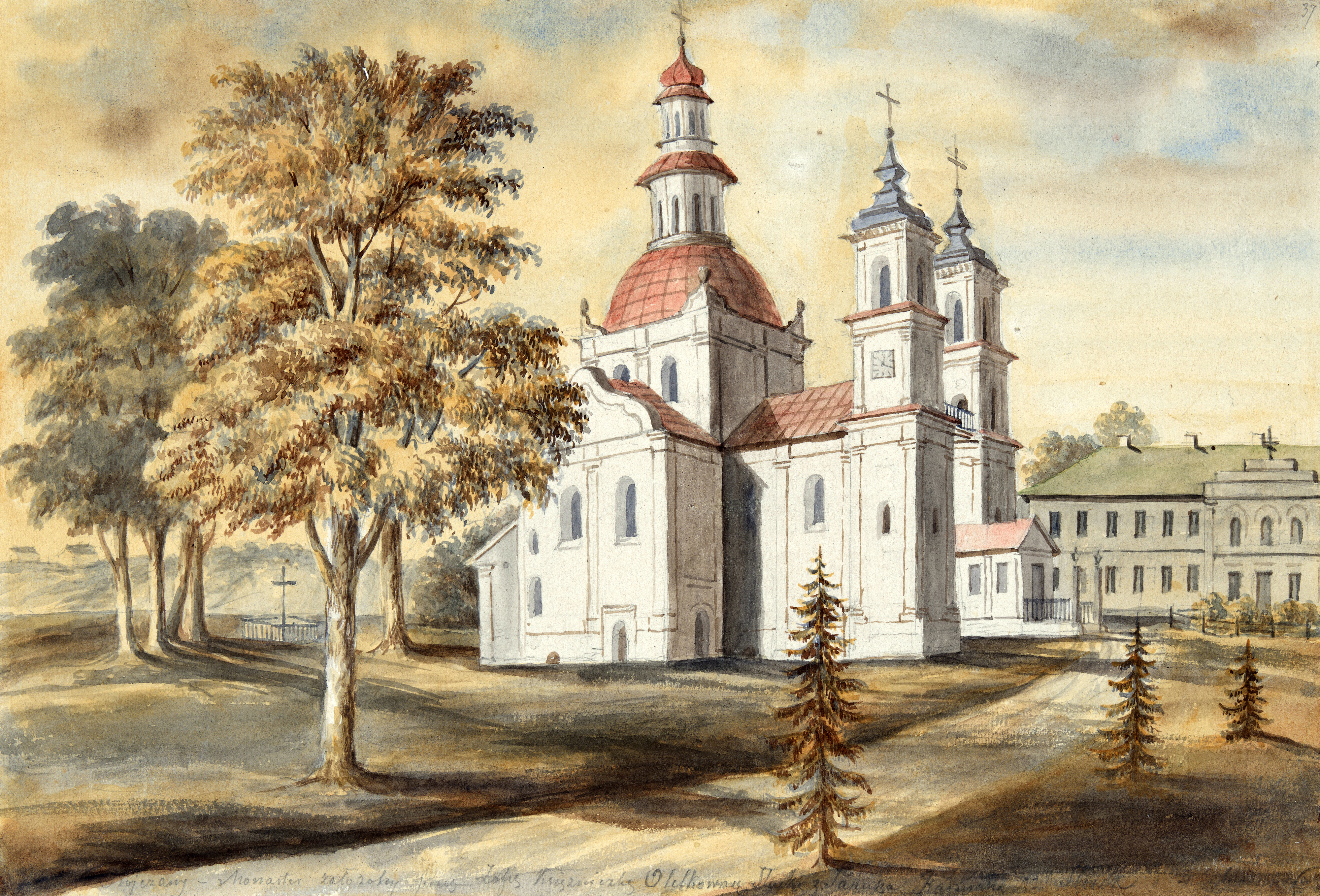 Беларуская (тарашкевіца): Слуцак (Słucak), Трайчаны (Trajčany). Царква і манастыр Сьвятой Тройцы